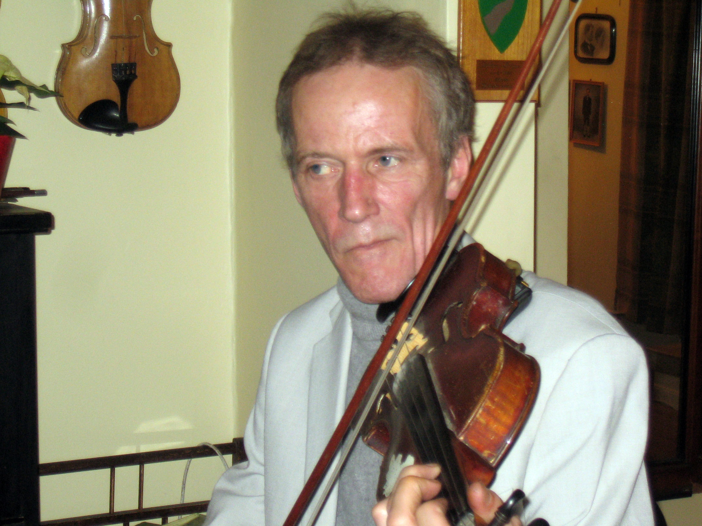 Felespelar Svein Nymo i 2006.